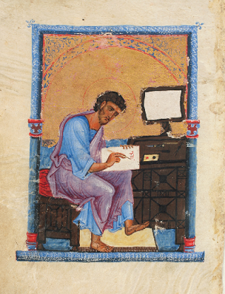 წყაროსთავის II ოთხთავი